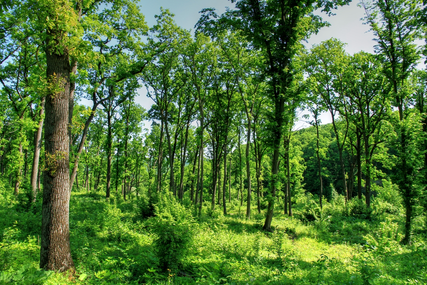 Цигэнешть, монумент природы, находится в Кэлэрашский район, Между селами Сэсень, Табэра, Цигэнешть, Бравича, Бравичское лесничество, урочище Бравича, кварталы 50, 51, 58, 61, 62, 64, 65, 67 (код MD-CL-rp-012)